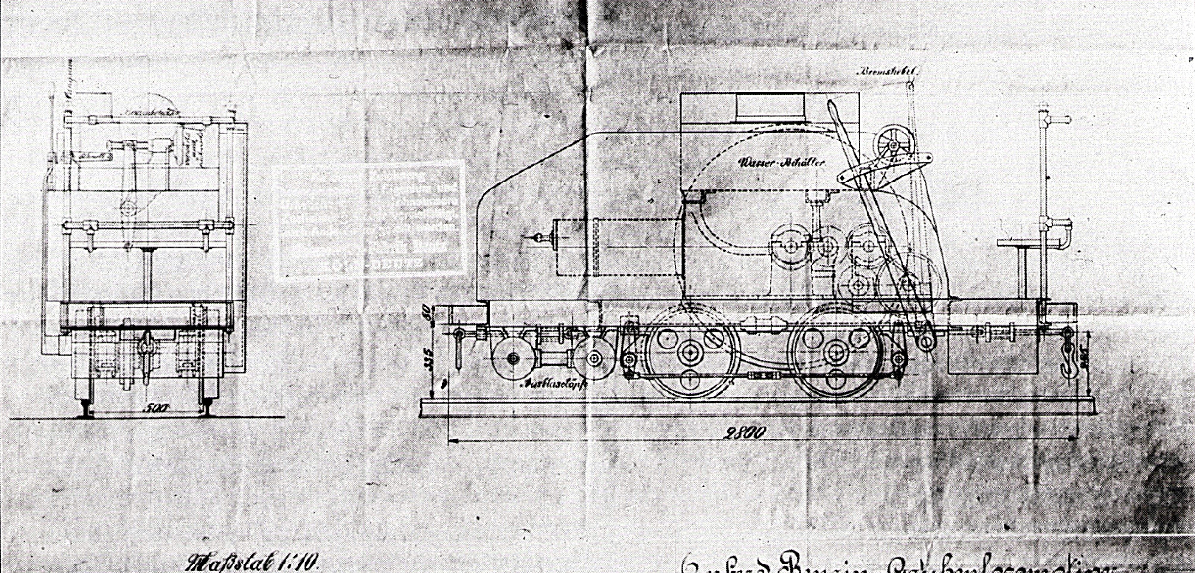 Benzinlokomotive der Grube Apfelbaumer Zug